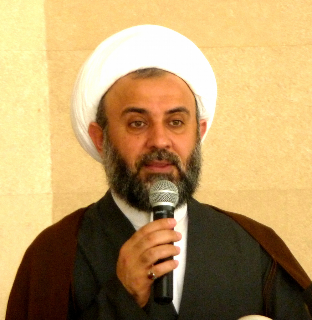 Sheikh Nabil Qaouk, also spelled Kaouk, Kawook, Qaouq. etc. Il sud del Libano è difeso dagli Hezbollah, che hanno fermato gli israeliani. Là siamo stati signorilmente ricevuti da questo sceicco, che ho fotografato nella sua bellezza. Anche le compagne del gruppo ne sono state molto affascinate. Però erano offese perchè gli hezbollah non danno la mano ad una donna (questo equivarrebbe ad una promessa matrimoniale) ma si inchinano e si portano la mano sul cuore. Io ho suggerito che questo poteva corrispondere ad un desiderio di fedeltà coniugale, per non essere turbati dal fascino di altre donne. Però non ho avuto molto credito. Cosa abbia detto lo sceicco non lo ricordo. Invece ricordo bene quello che poi ci ha detto un responsabile politico degli hezbollah. Gli avevamo chiesto cosa pensava di uno stato palestinese unico, per palestinesi ed ebrei; un uomo, un voto. Lui ha risposto che per centinaia di anni i mussulmani sono andati d'accordo con gli ebrei, che invece erano perseguitati e scacciati dall'Europa. Quindi è certamente possibile la convivenza pacifica dei due popoli in un solo stato. Questo responsabile politico a me sembrava molto in gamba, ma anche molto brutto. Ho detto alle compagne: "Avete visto? uno così brutto ha detto delle cose così interessanti!" Mi si sono rivoltate contro. "Non capisci niente di bellezza maschile! Era un uomo stupendo, anche se con un fascino un po' tenebroso!" Però io la sua foto non la metto; almeno in foto continua a sembrarmi proprio brutto.